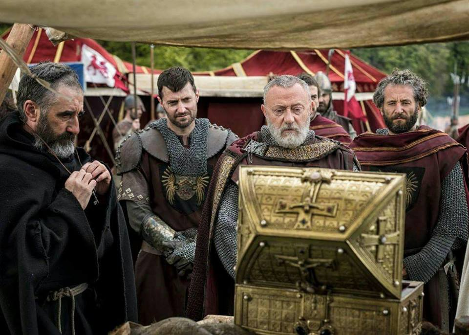 Casting du film